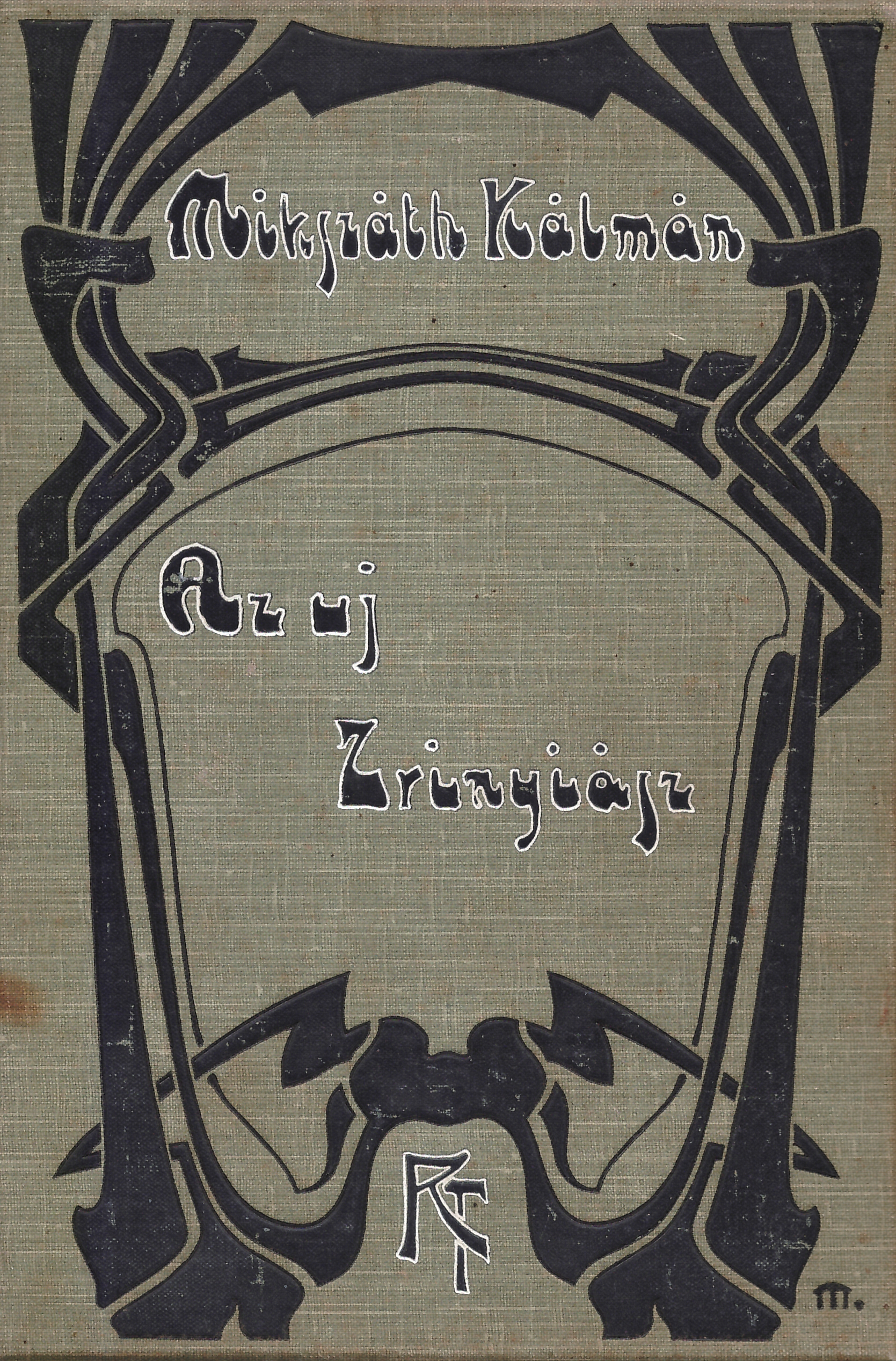 Mikszáth Kálmán (1847-1910): Új Zrínyiász (1910-es évek)